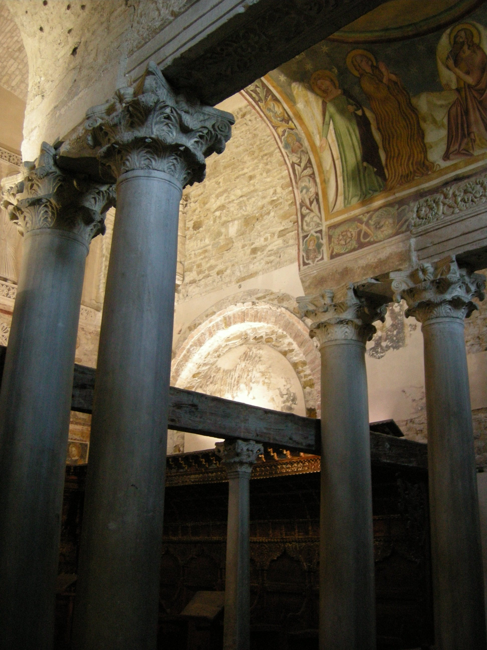 Cividale, tempietto longobardo